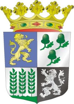 Wapen gemeente Castricum